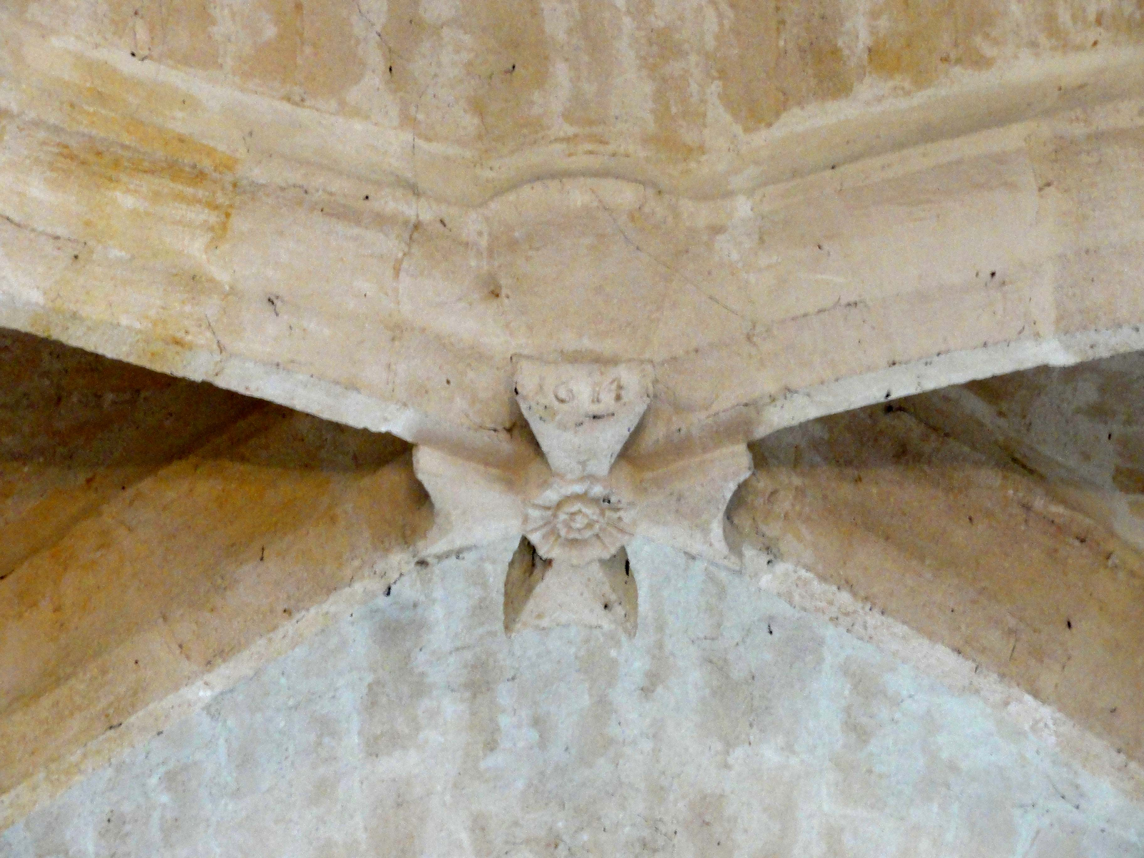 Collatéral, clé de voûte de la 2e travée, côté nord - date 1614.